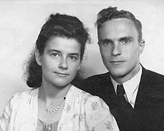 Arnd Freiherr von Wedekind (1919-1943) mit seiner Verlobten